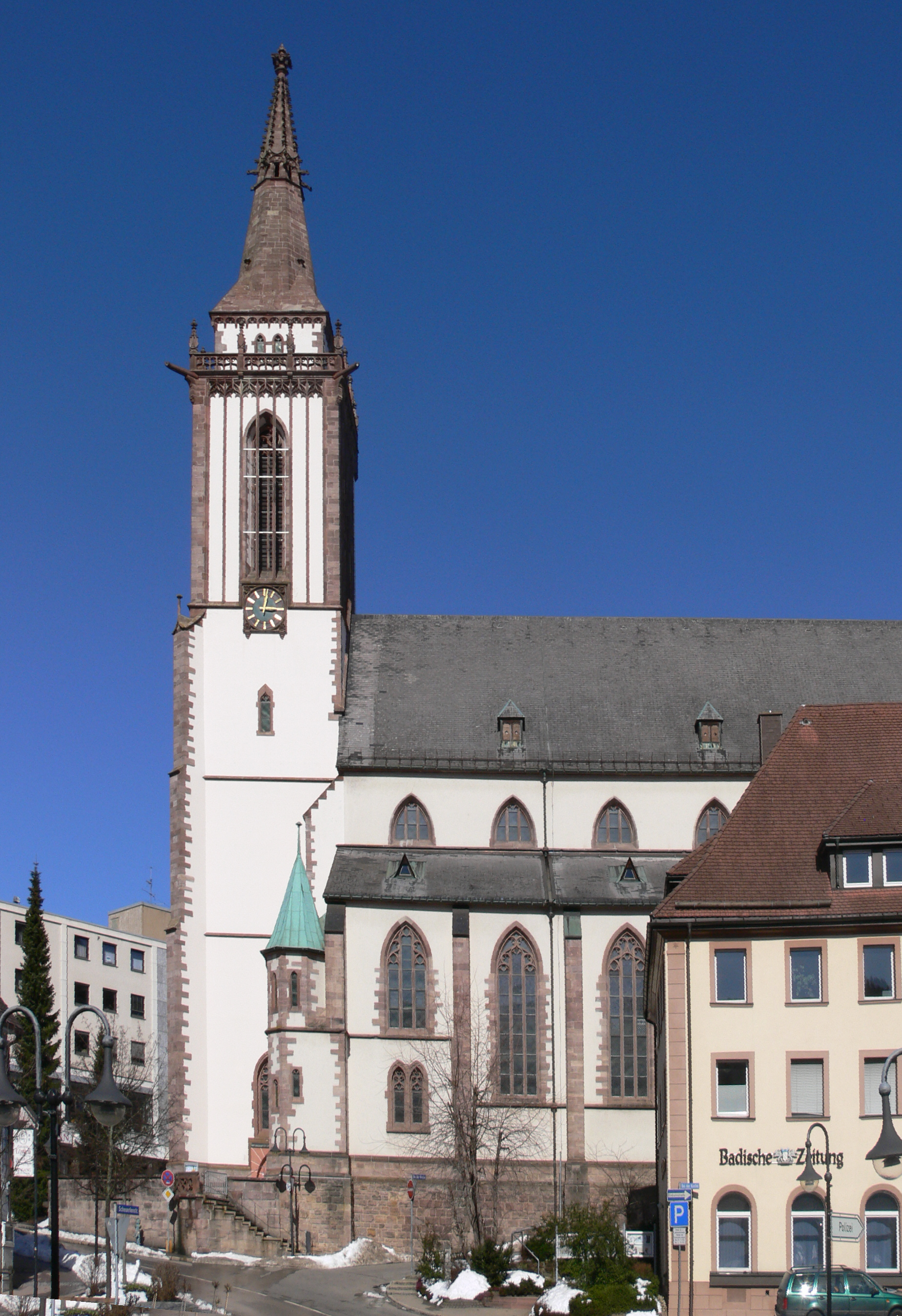 Kath. St.-Jakobus-Münster in Neustadt (Titisee-Neustadt)